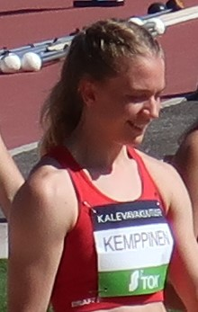 Lotta Kemppinen 200 metrin juoksun alkueränsä jälkeen Kalevan kisoissa 2020.